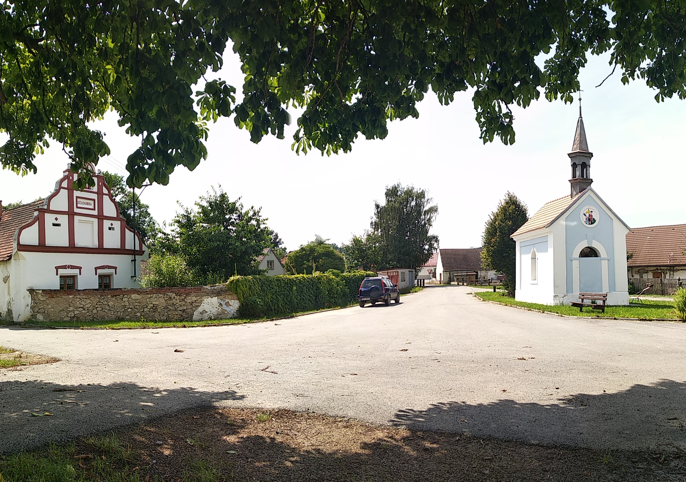 Náves v jihočeské vesnici Svaryšov, okres Strakonice